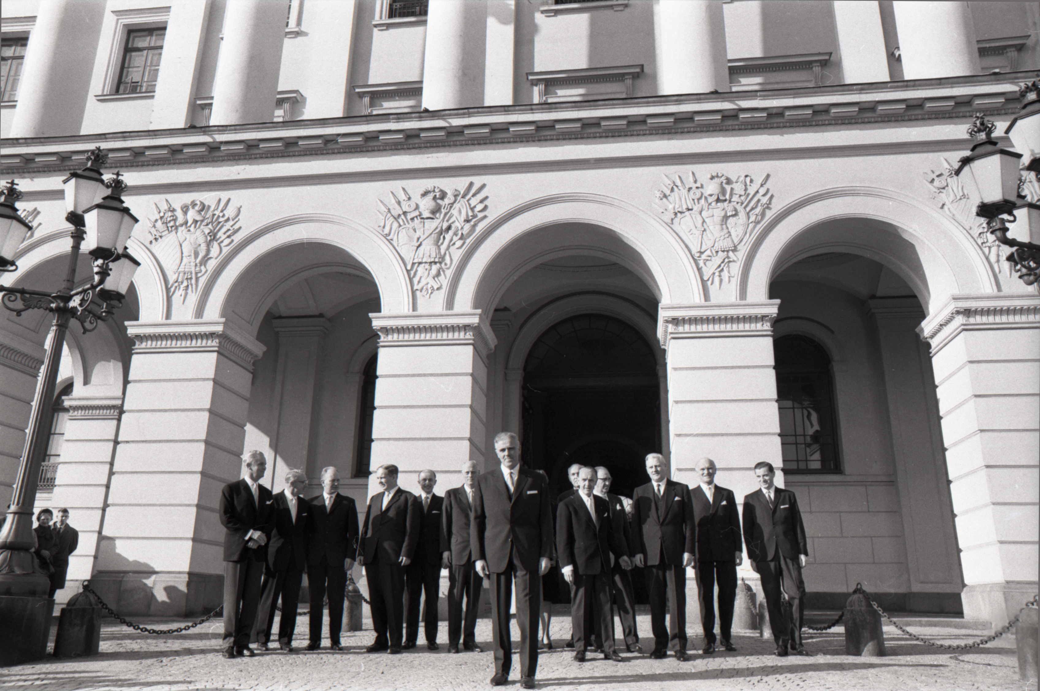 Bildet er hentet fra Arkivverket. Regjeringen Borten har sitt første statsråd på Oslo slott. NÅ nr. 43, 1965. Per Bortens regjering ble utnevnt 12. oktober 1965 og satt til 17. mars 1971. Arkivinstitusjon : Riksarkivet Arkivnavn : Billedbladet NÅ Sted : NORGE, Oslo, Oslo, Emneord: Norske regjeringer, Norske statsministre, Politikk Avbildet: Statsminister Per Borten (Sp) står foran (fra venstre) forsvarsminister (seinere handelsminister) Otto Grieg Tidemand (H), arbeids- og sosialminister Egil Aarvik (KrF), industriminister Sverre Walter Rostoft (H), kommunal- og arbeidsminister Helge Seip (V), handels- og skipsfartsminister Kåre Willoch (H), finans- og tollminister Ole Myrvoll (V), (justis- og politiminister Elisabeth Schweigaard Selmer (H) og familie- og forbrukerminister Elsa Skjerven (KrF) skjult bak Borten), kirke- og udervisningsminister Kjell Bondevik (KrF), fiskeriminister Oddmund Myklebust (Sp), landbruksminister Bjarne Lyngstad (V), utenriksminister John Lyng (H), samferdselsminister Håkon Kyllingmark (H) og lønns- og prisminister Dagfinn Vårvik (Sp).